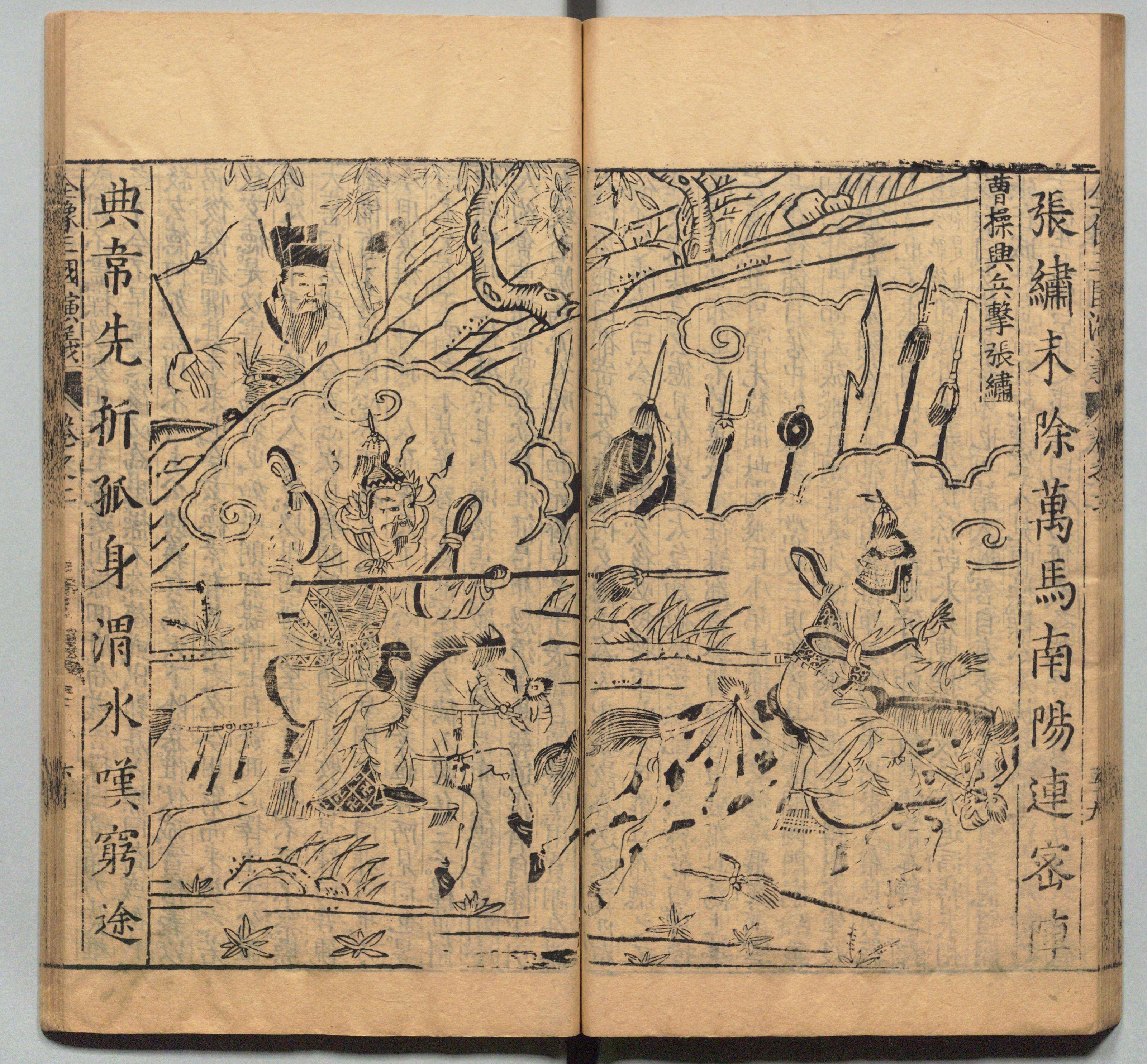 《新刊校正古本大字音释三国志通俗演义》 明万历十九年书林周曰校刊本